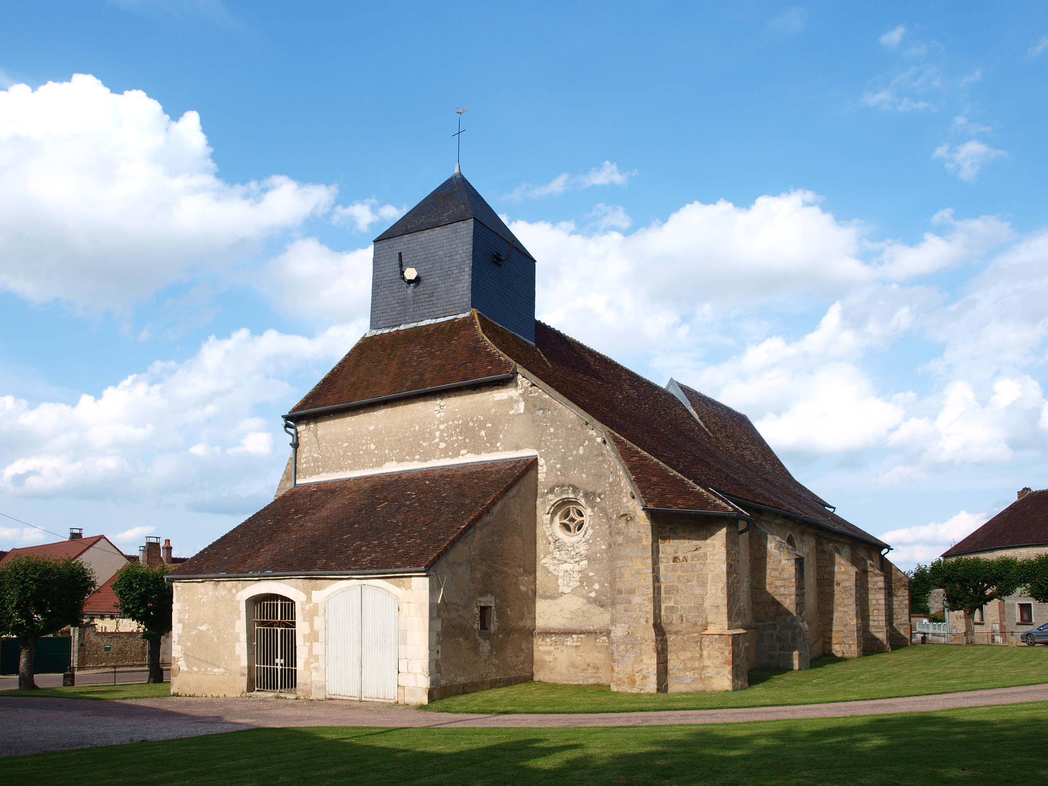 Champlay (Yonne, France) ; l'église